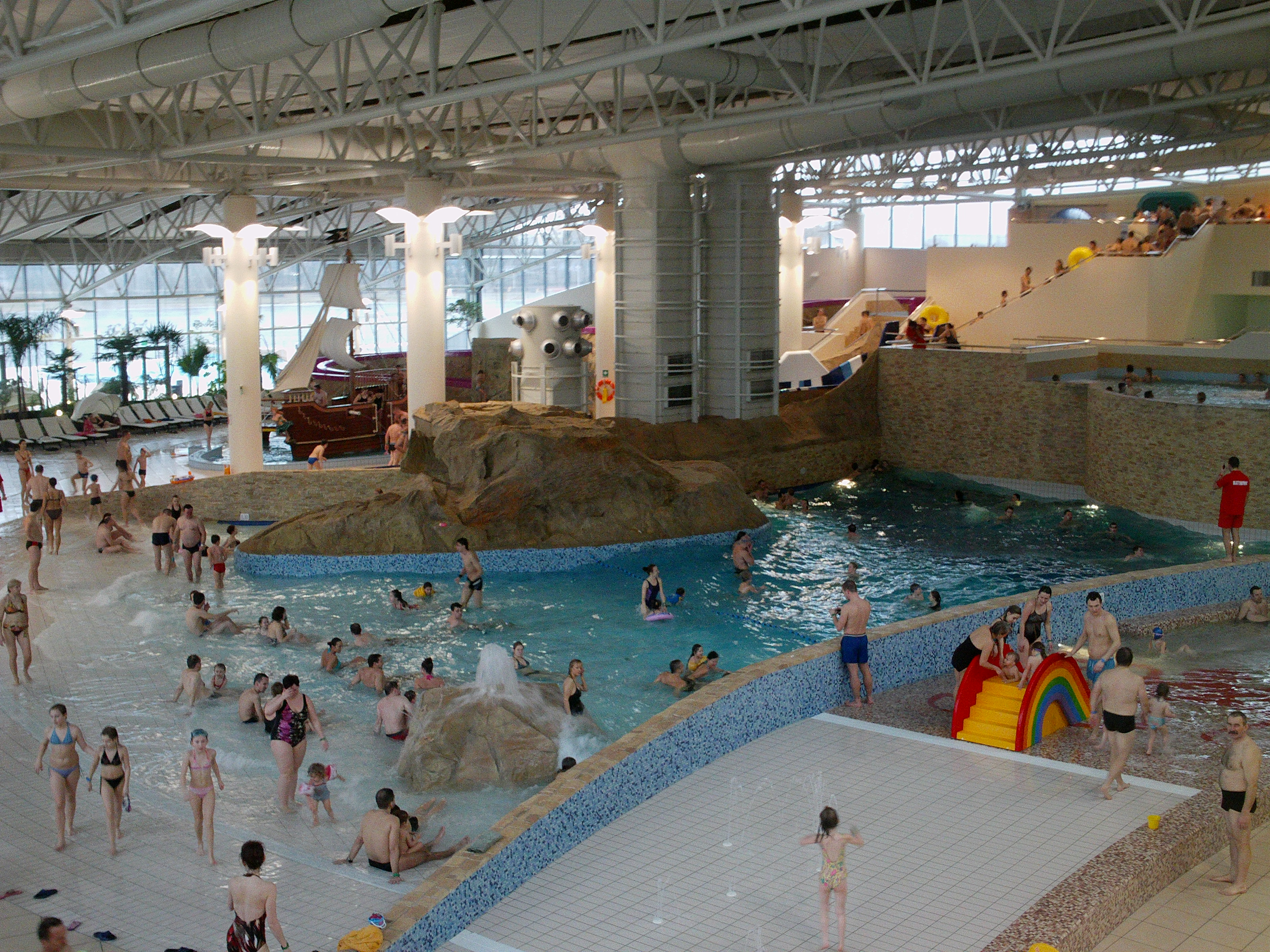 baseny rekreacyjne, Poznań.